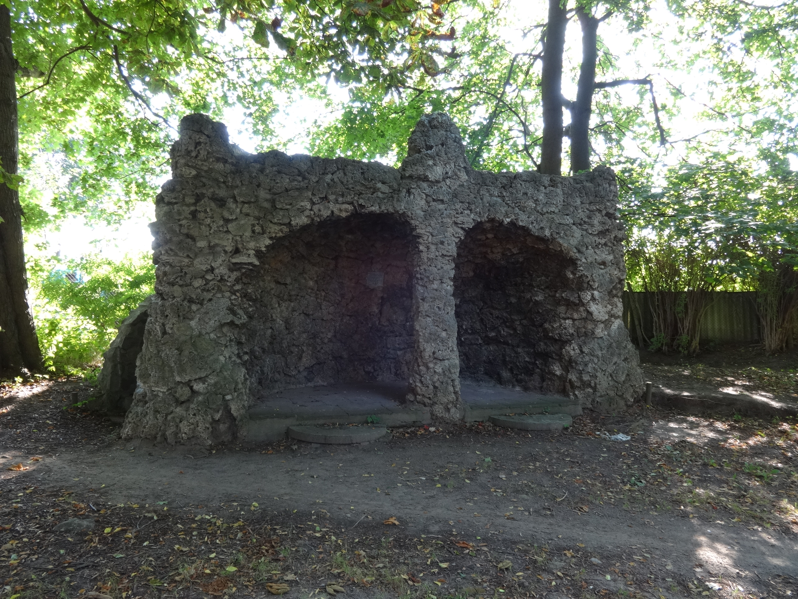 Bürgerpark in Pasewalk, Mecklenburg-Vorpommern, angelegt 1898 auf Initiative des Bürgermeisters Albert Will